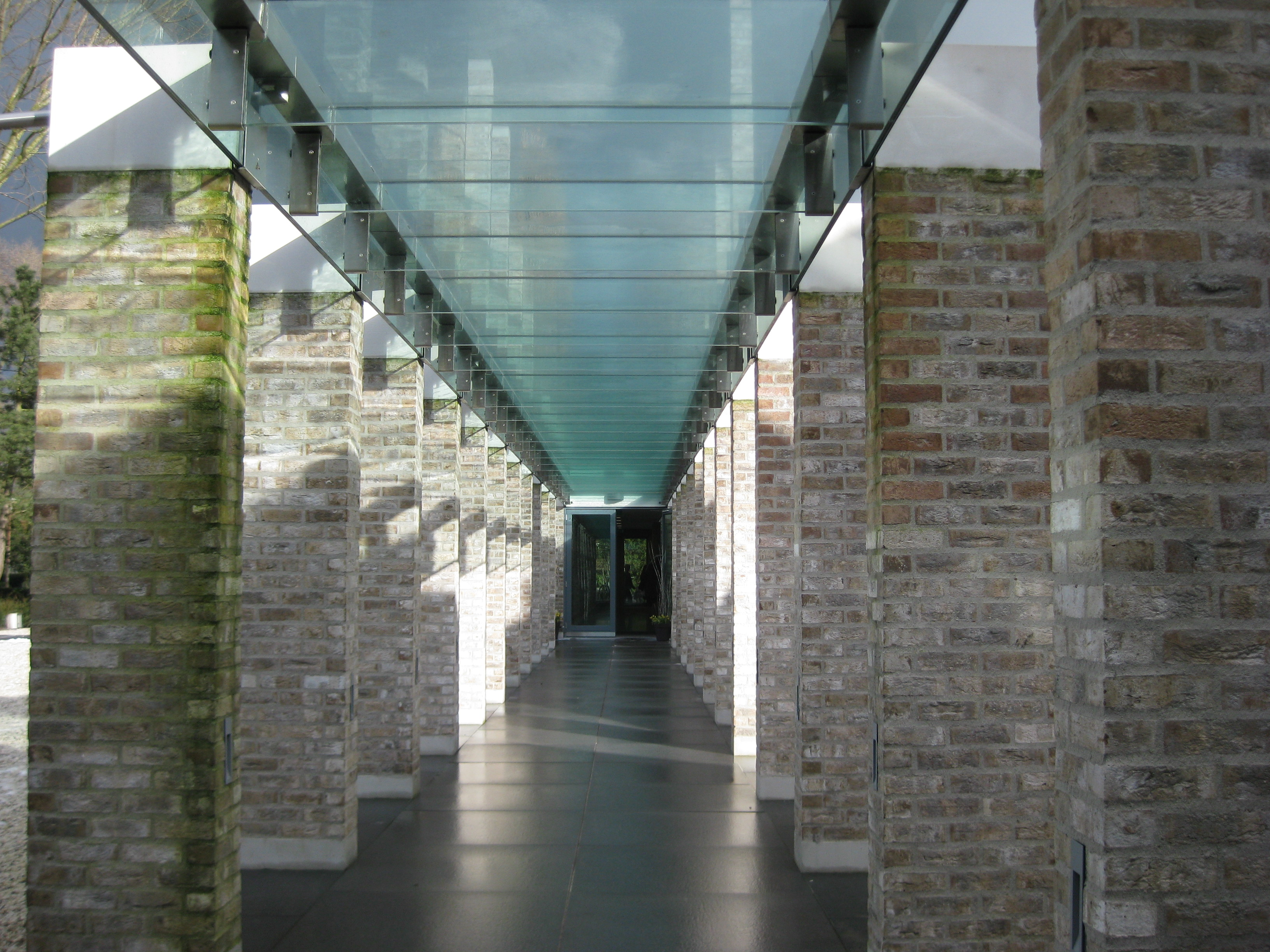 Gang naar de koffiekamer van begraafplaats en crematorium De Nieuwe Noorder in Amsterdam-Noord